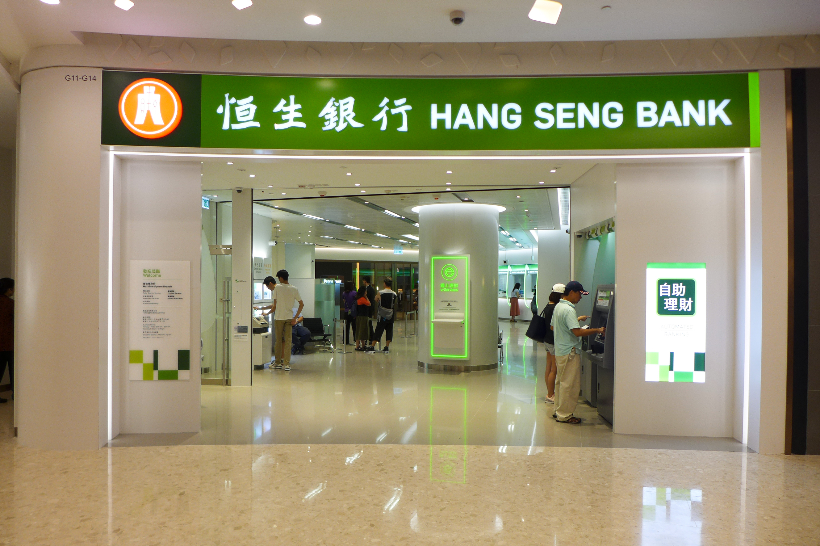 Hang Seng Bank in Maritime Square 1